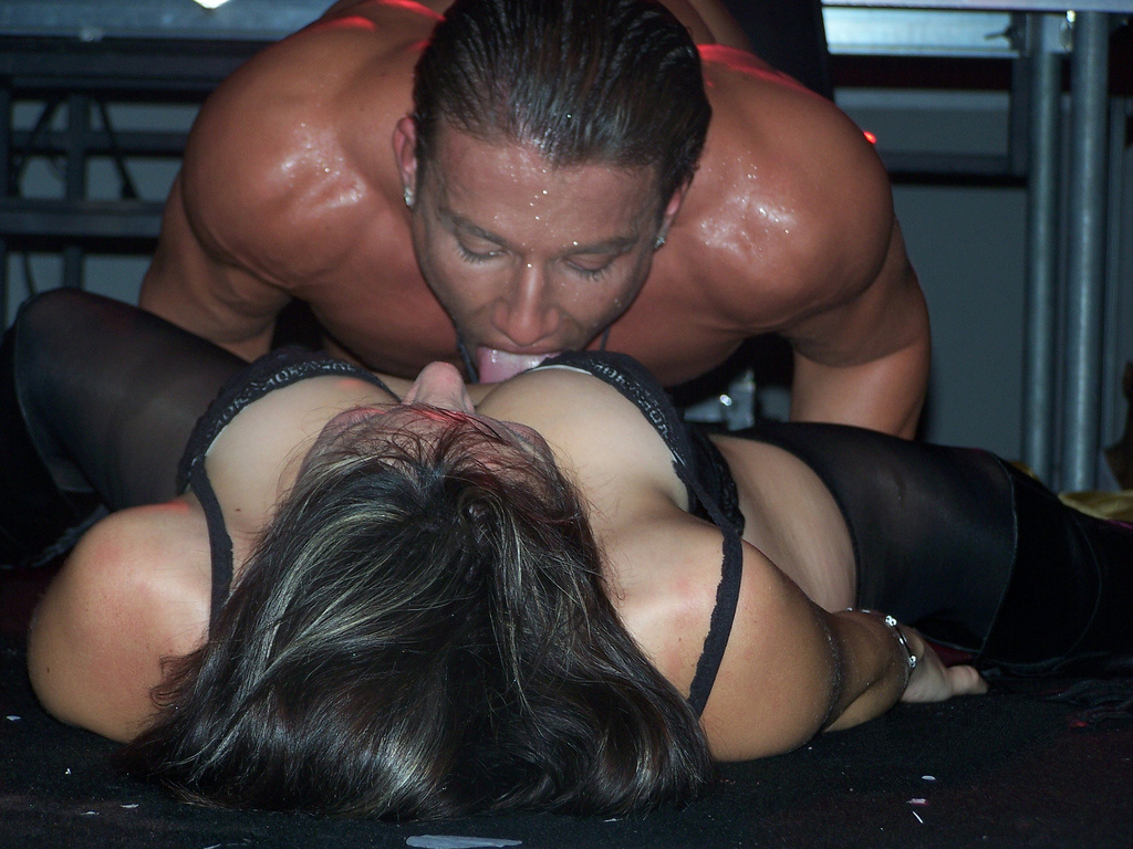 Eropolis Toulouse 2008